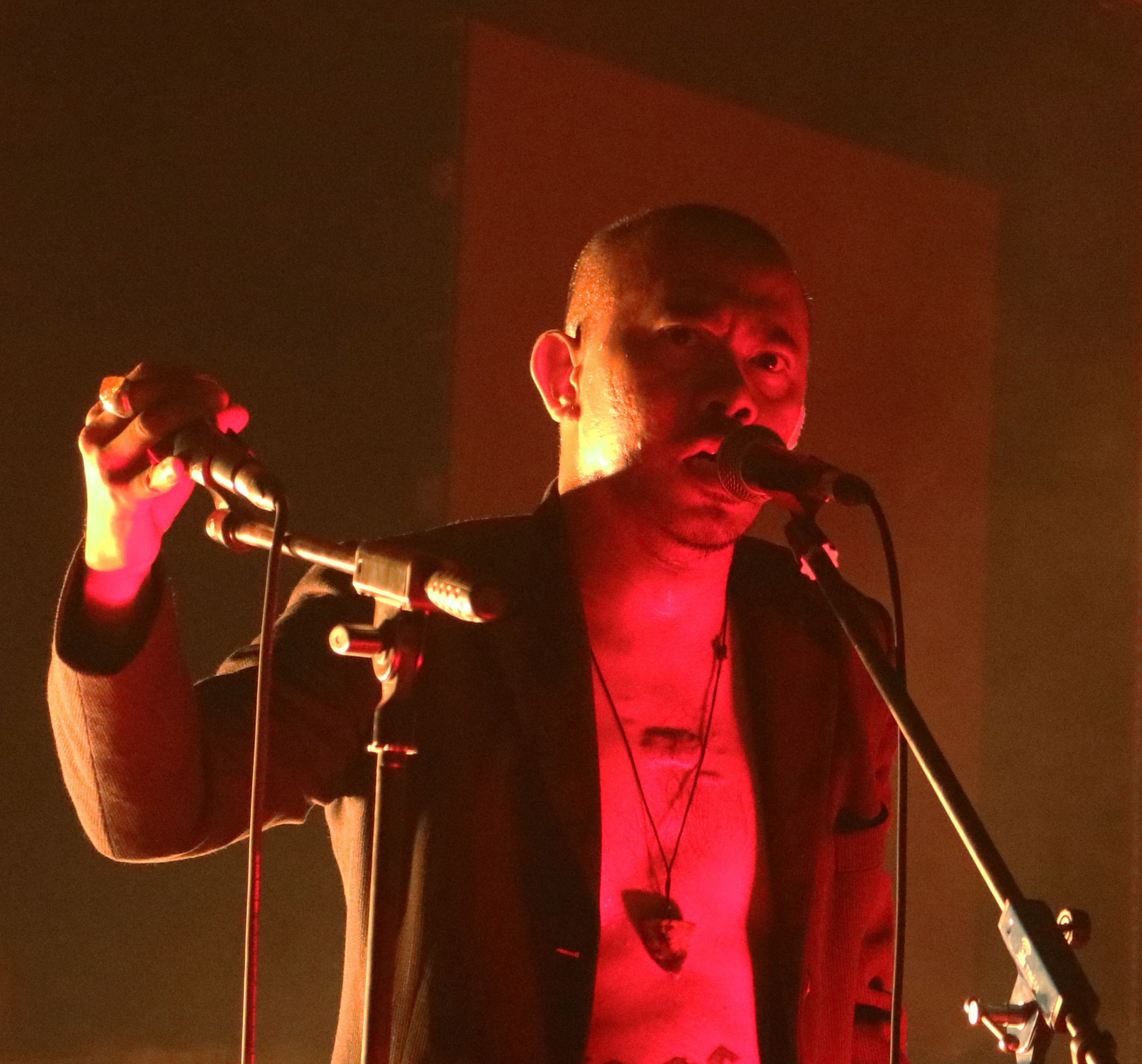 di Indonesia Netaudio Festival 3, Yogyakarta